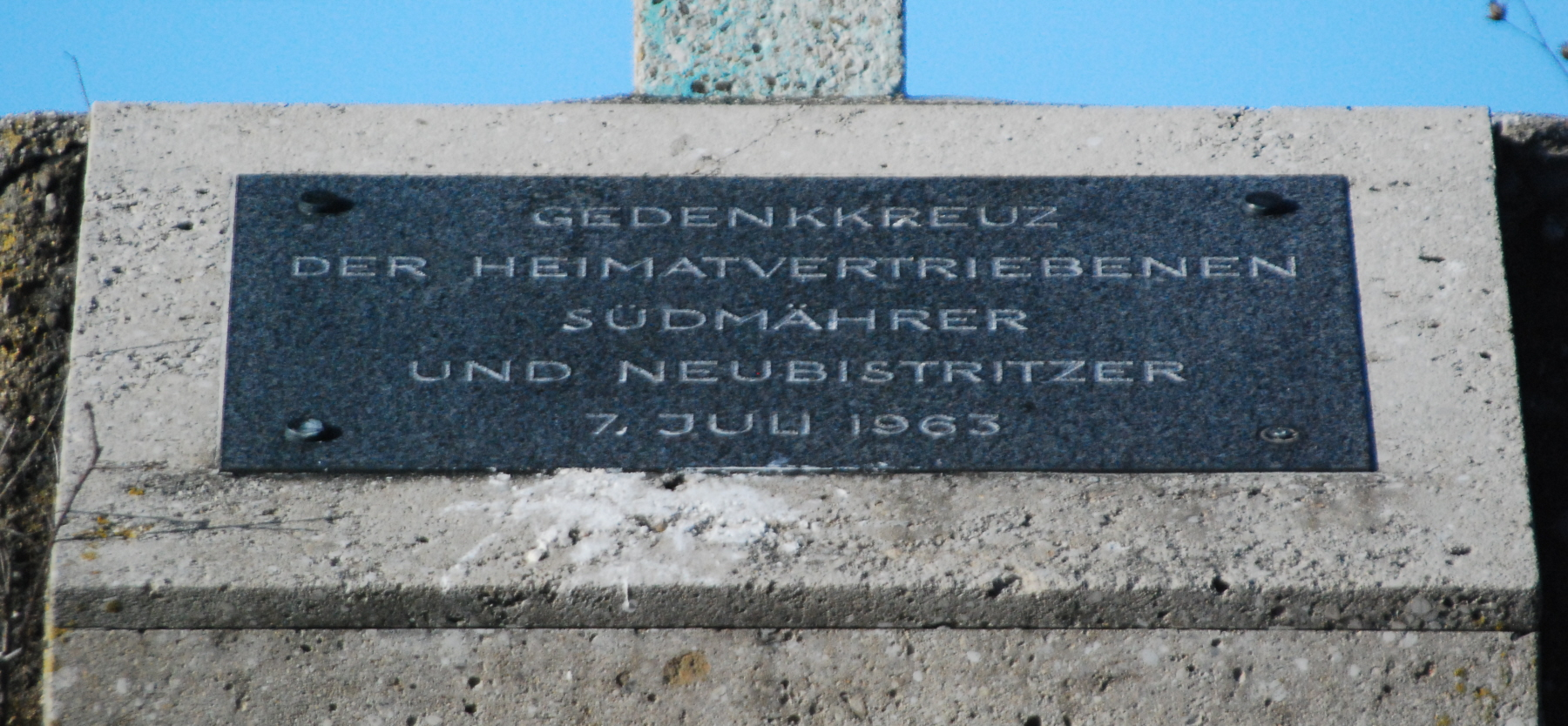 Tafel am Südmährerkreuz in Kleinschweinbarth in Niederösterreich